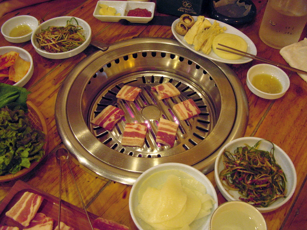 삼겹살 Samgyupsal